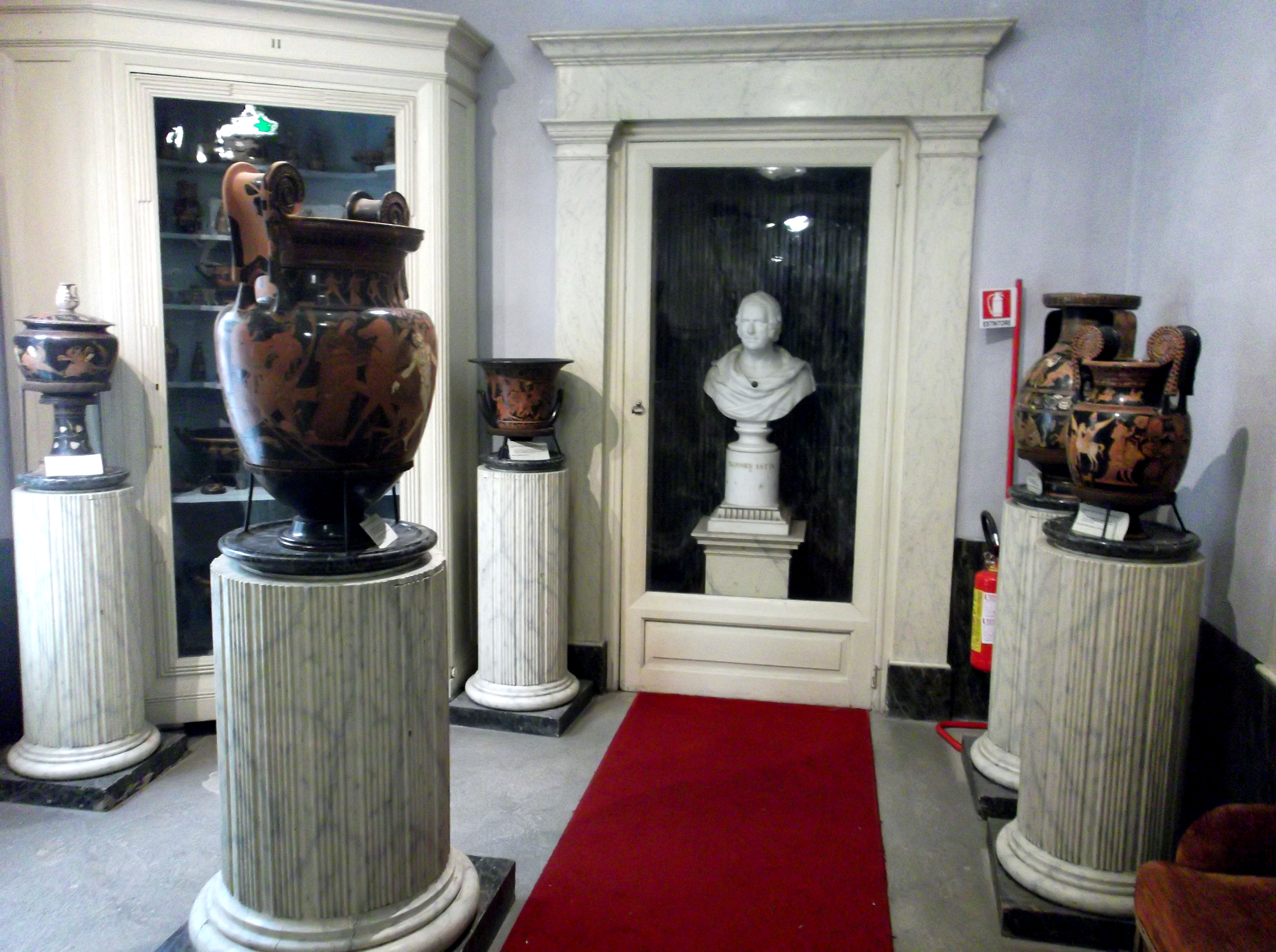 Quarta sala del Museo Jatta